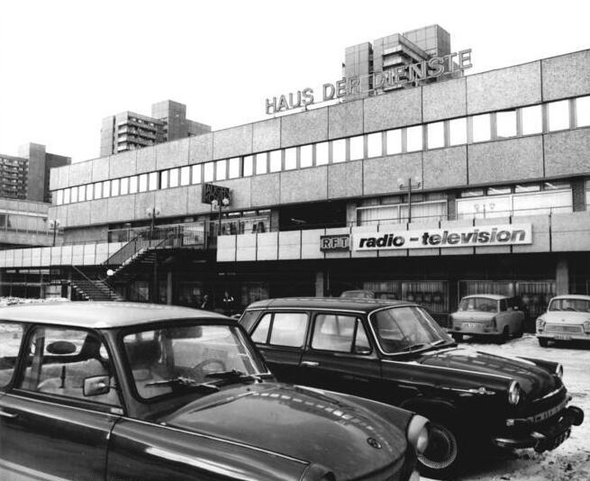 Halle, "Haus der Dienste" ÂDN-ZB-Lehmann-13.1.82 Halle: Das in Halle-Neustadt neu eröffnete Haus der Dienste bietet den Bürgern 123 hauswirtschaftliche Dienstleistungen, Servicewerkstätten wie Maßschneidereien, Fotoatelier und für Augenoptik. In 18 speziellen Einrichtungen, die eine Gesatmfläche von fast 6.900 Quadratmetern belegen, sorgen sich die rund 360 Mitarbeiter um die großen und kleinen Wünsche der Halle-Neustädter. - siehe auch 1982-0113-1n und 2n